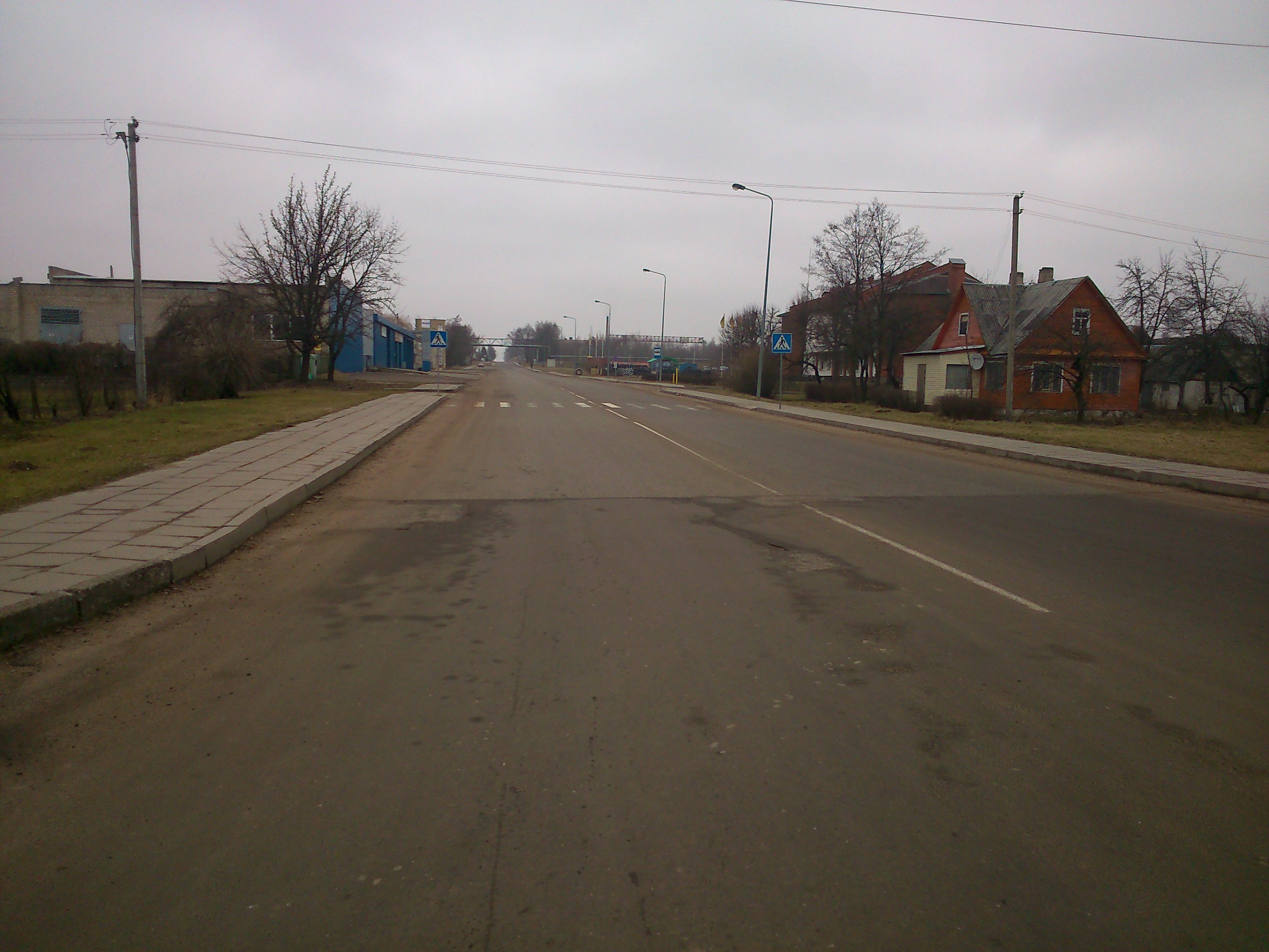 Fabriko gatvė, Jonava (2014)